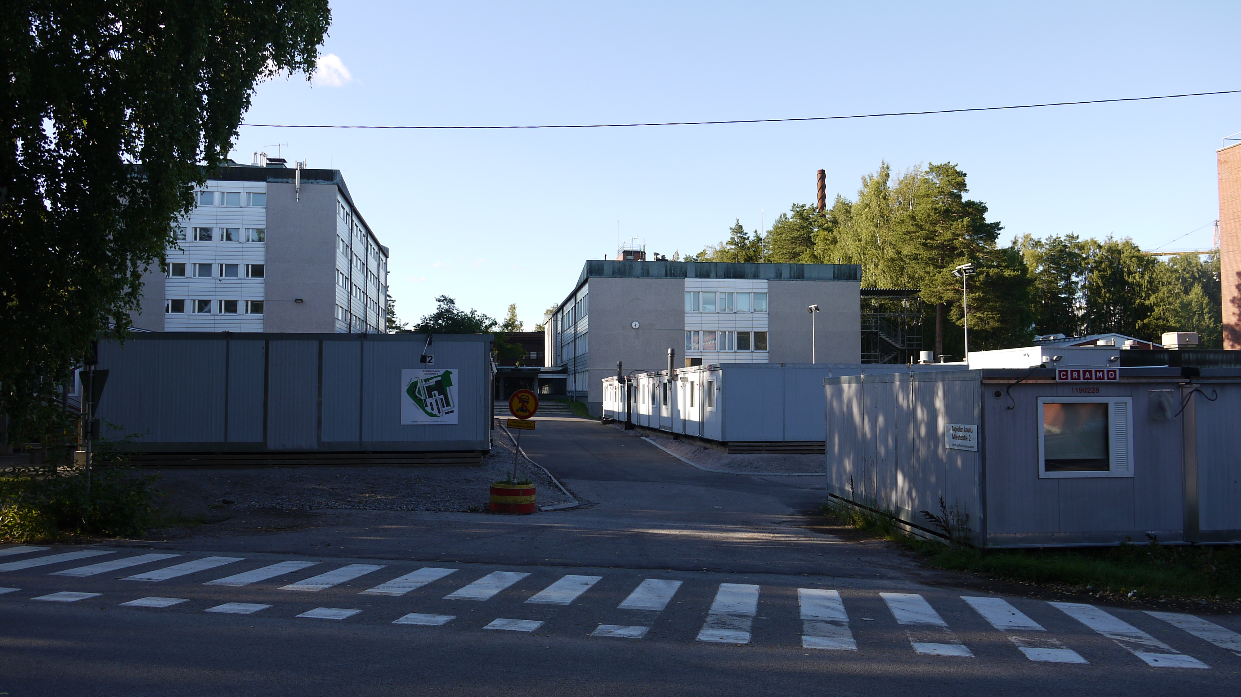 Tapiolan koulun parakit Espoon Otaniemessä. (Miestentie 2)